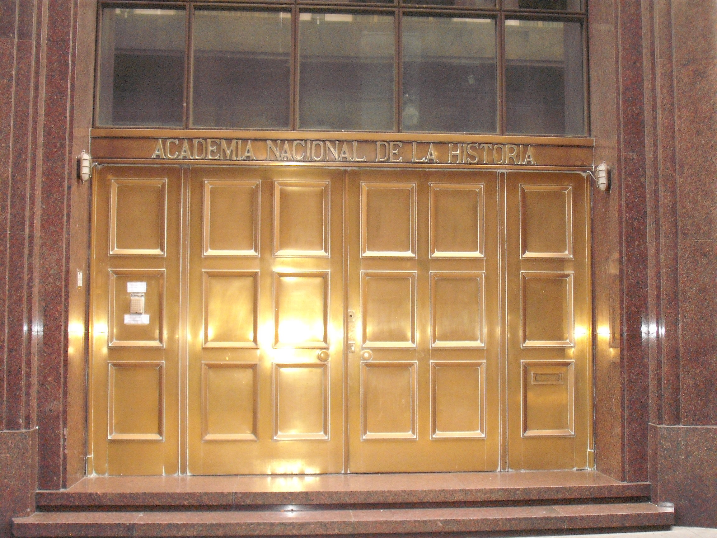 Fotografía de la entrada principal de la Academia Nacional de la Historia, sita en la calle Balcarce 139